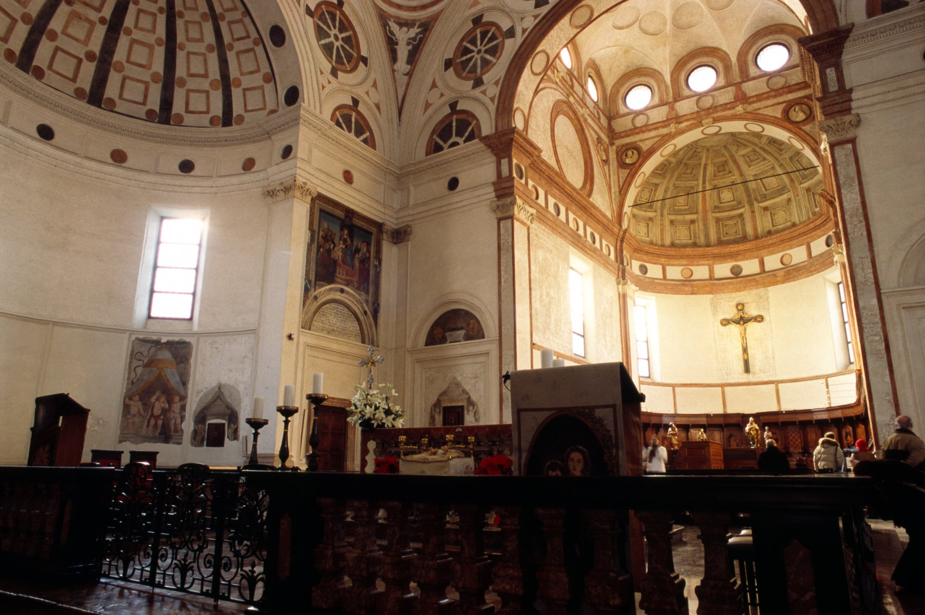 Altar of Santa Maria delle Grazie church, Milan 30.12.2005. Photo by Mikko Virtaperko